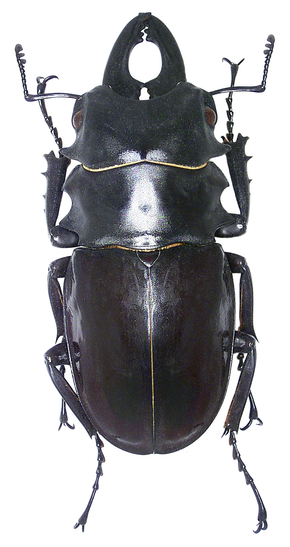 Familie: Lucanidae Grösse: 52-87 mm Verbeitung: Indonesien det. U.Schmidt Foto: U.Schmidt, 2007